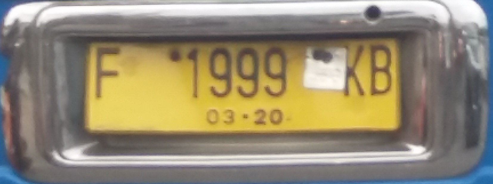 Taxikennzeichen Indonesien